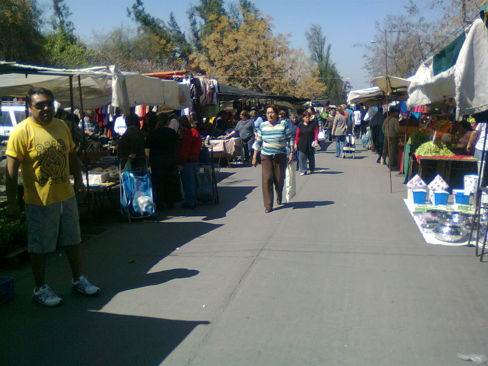 La feria libre Padre Hurtado, donde se comercializan principalmente frutas y verduras en sus 221 locales. Esta feria se instala los días martes y viernes en la calle Huáscar (entre San José y Padre Hurtado). Comuna de Maipú, Santiago de Chile, 13 de septiembre de 2011.